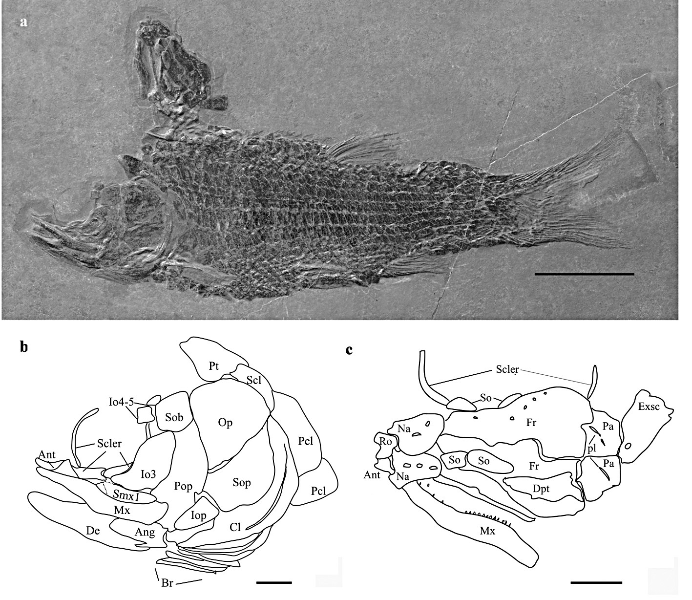 GMPKU-P-3181, a skeleton. Its type locality is Layer 35, Nimaigu Village, Wusha Township, Xingyi, which is in a Longobardian marine limestone in the Falang Formation of China.